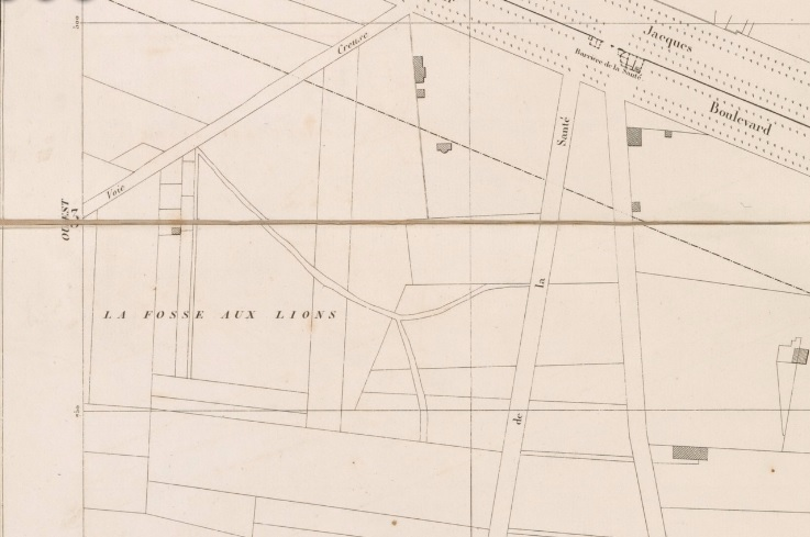 La Fosse aux Lions sur la planche n°50 de l'atlas de Jacoubet, vers 1830.